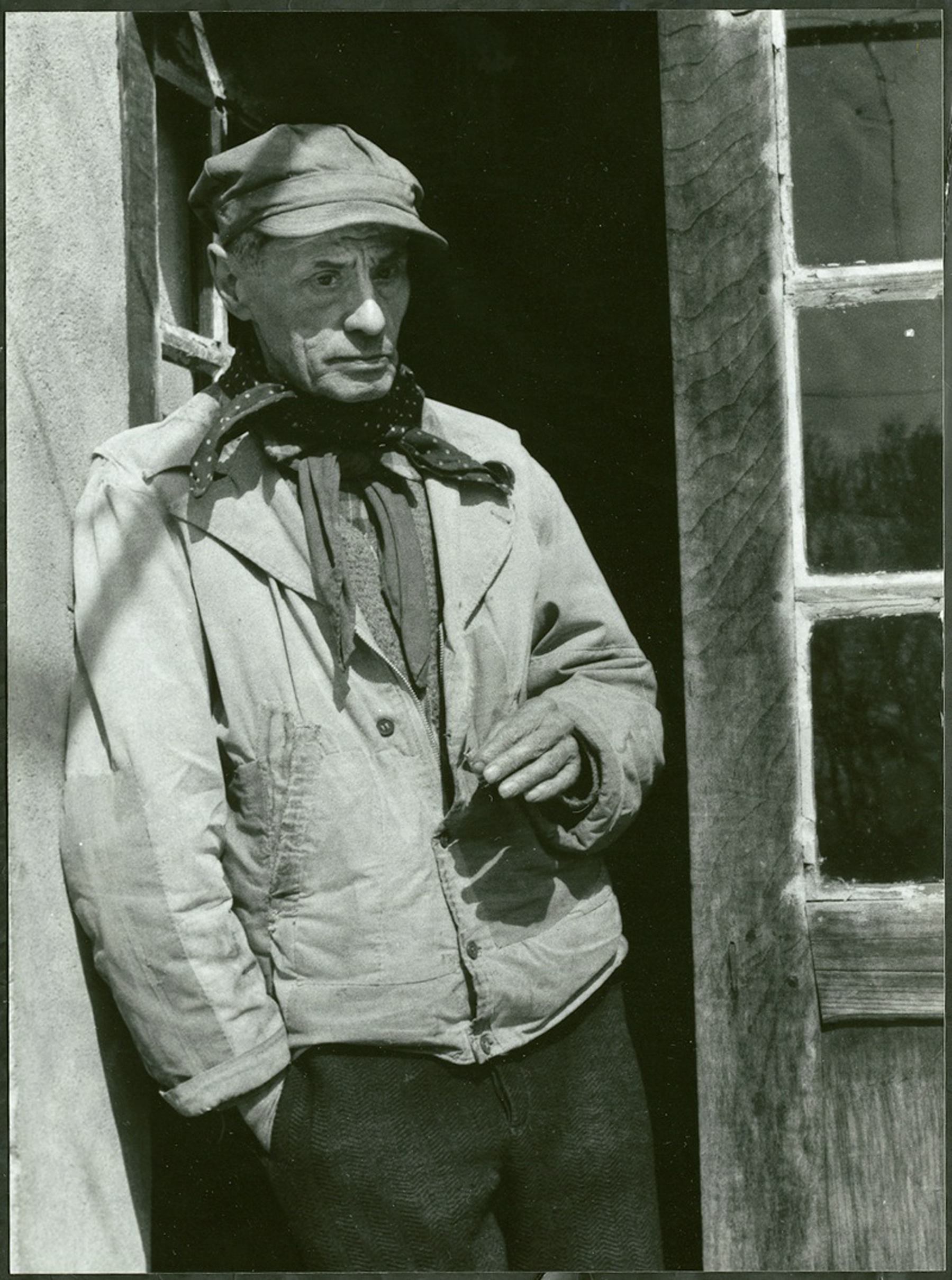 Roger Bissière dans l'embrasure d'une porte, 1960